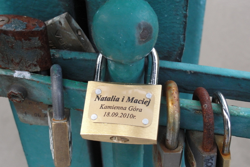 Wrocław, Most Tumski, 1888-1889